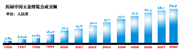 96-08年历年五金博览会交易量